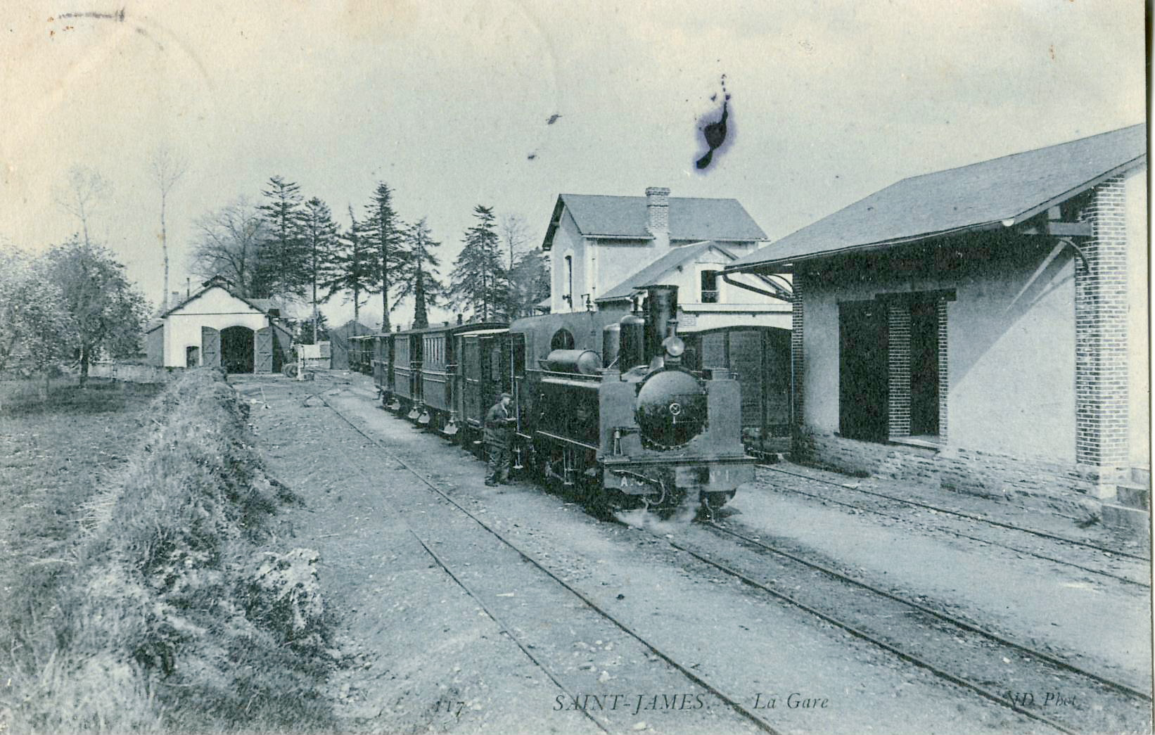 Carte postale ancienne éditée par ND, n°117 : SAINT-JAMES - La Gare